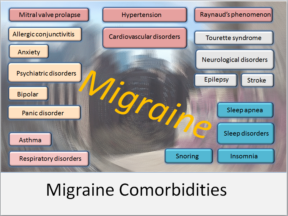 Migraine comorbidities